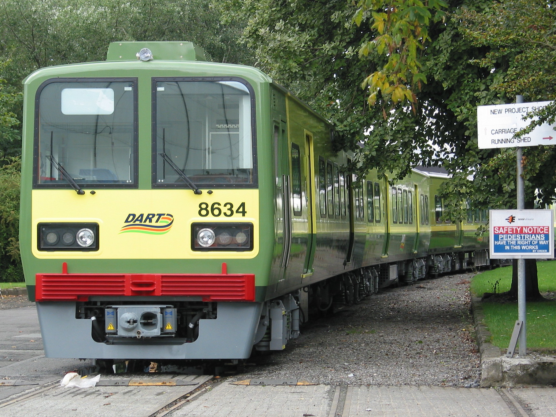 DART 8634 bei der Übernahme durch Iarnród Éireann